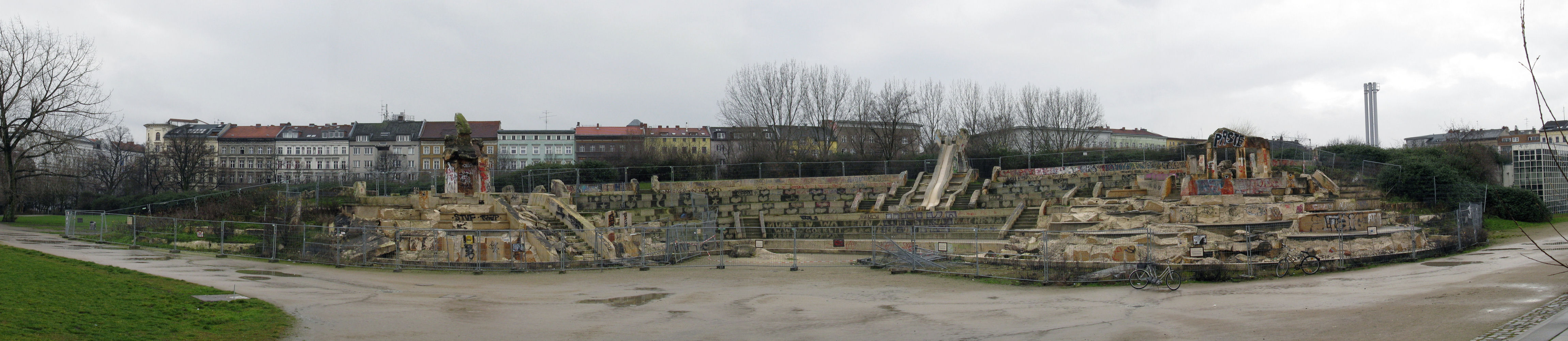 Das Pamukkale im Görlitzer Park, 20. Dezember 2008, Berlin-Kreuzberg